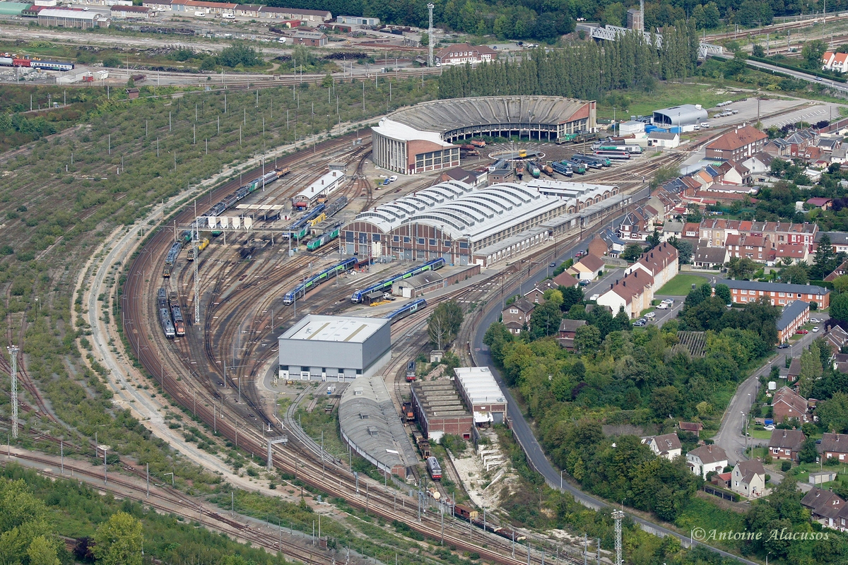 Survol du dépôt SNCF de Longueau (Somme-80)